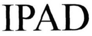 唯冠注册的iPad商标